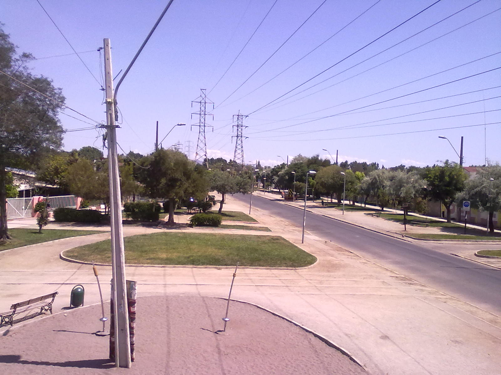 Jardines de la avenida Las Torres en la comuna de Lo Prado.